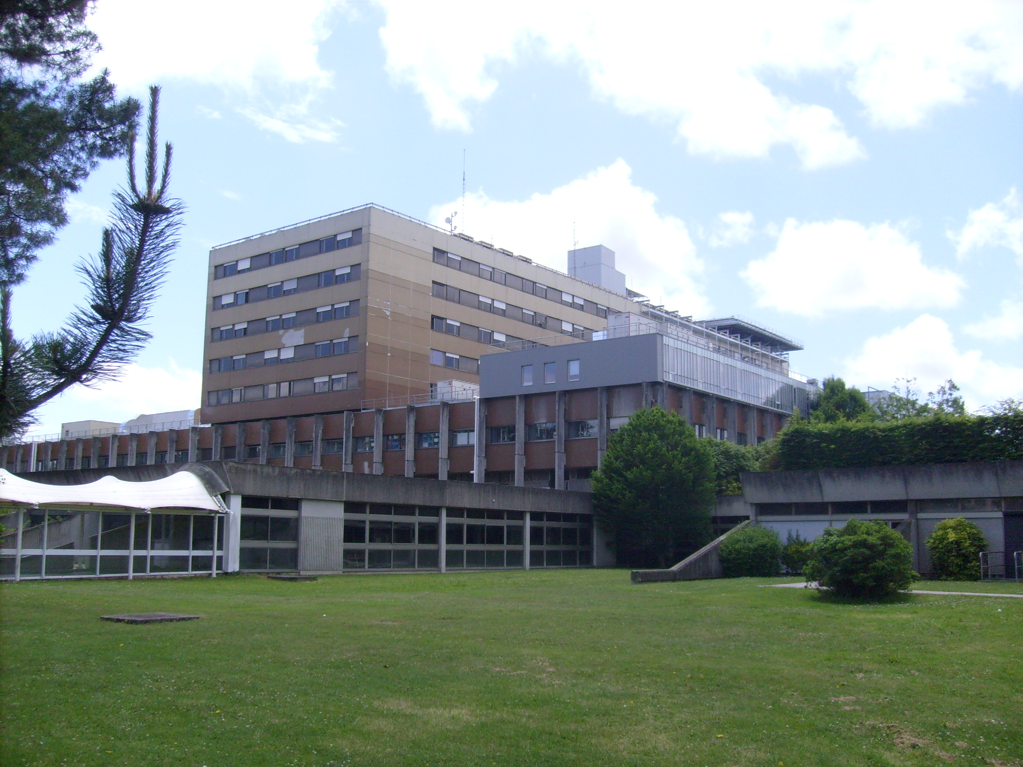 L'hôpital Haut-L'Eveque à Pessac (Gironde)